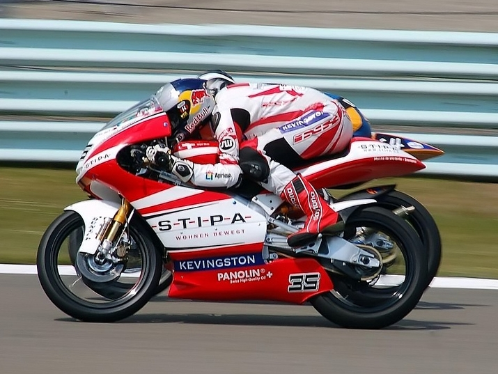 Dutch TT Assen